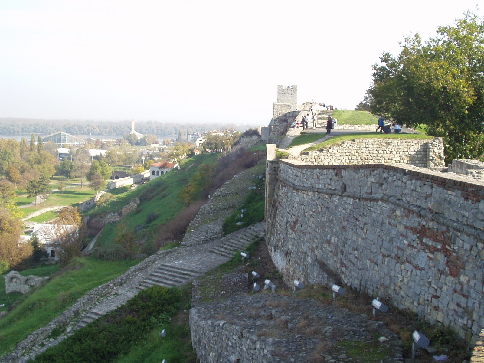 Fortifications du Kalemegdan. Auteur: Julien Vandeburie